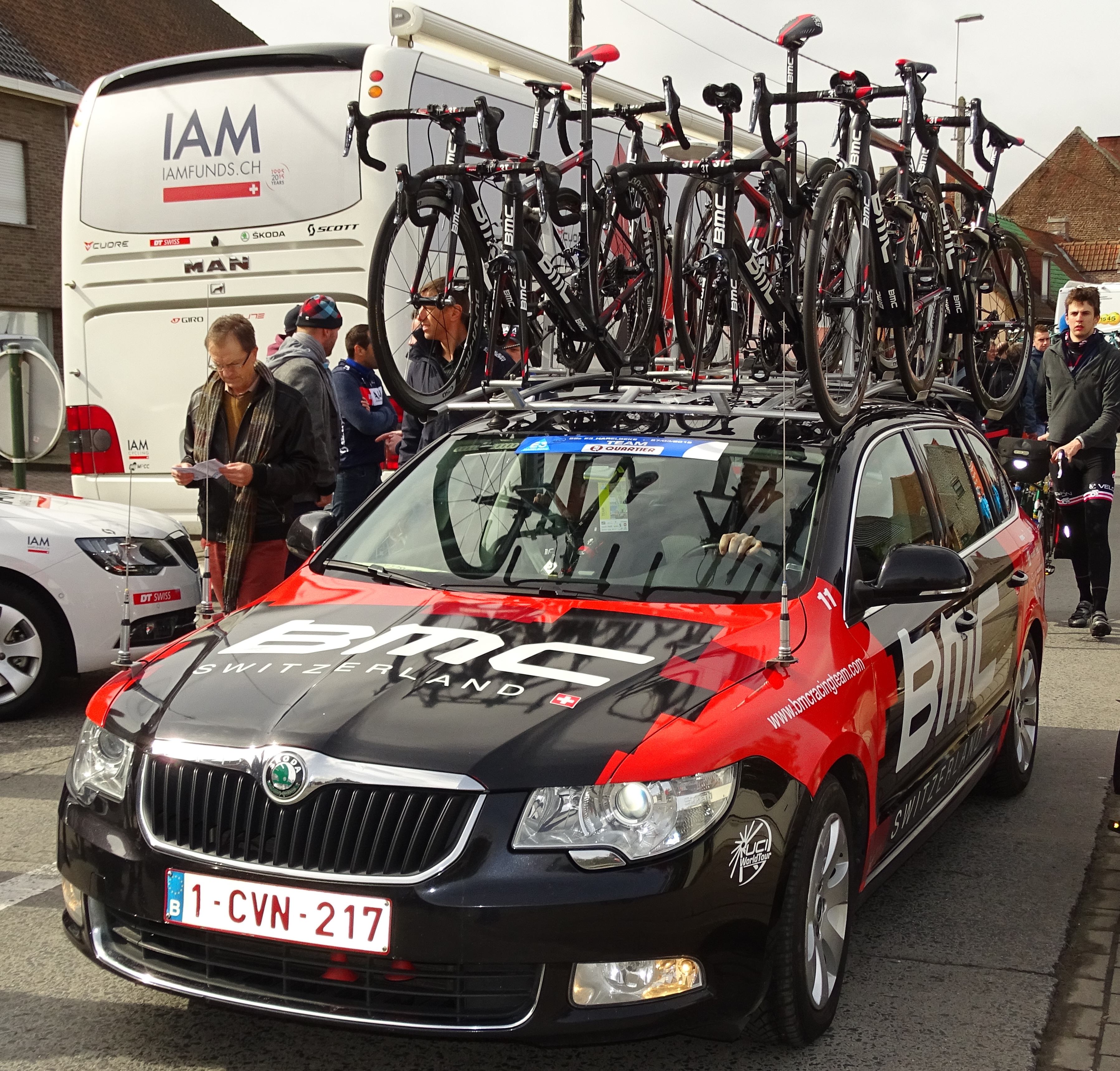 Reportage réalisé le vendredi 27 mars à l'occasion du départ et de l'arrivée du Grand Prix E3 2015 à Harelbeke, Belgique.